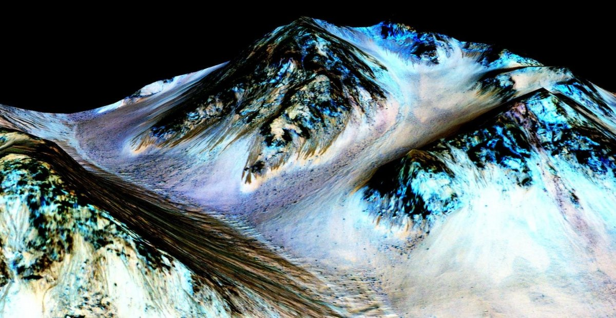 Dlhé stopy zanechala tečúca voda na Marse (Zdroj: NASA/JPL/University of Arizona)